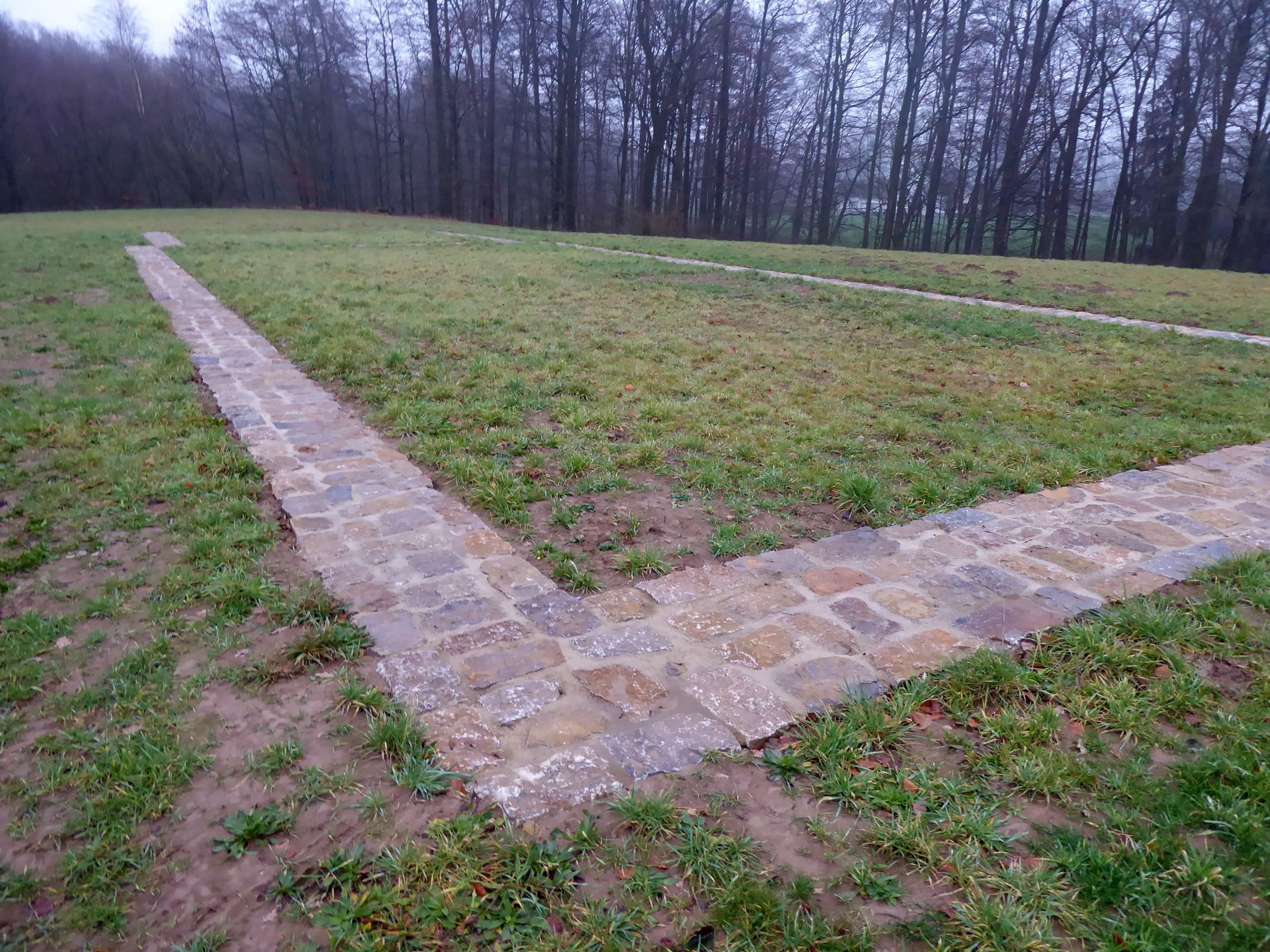 Kloster Müdehorst, Bielefeld, Grundmauern der Kirche